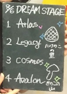 amiinAセトリボード(20170806(1))